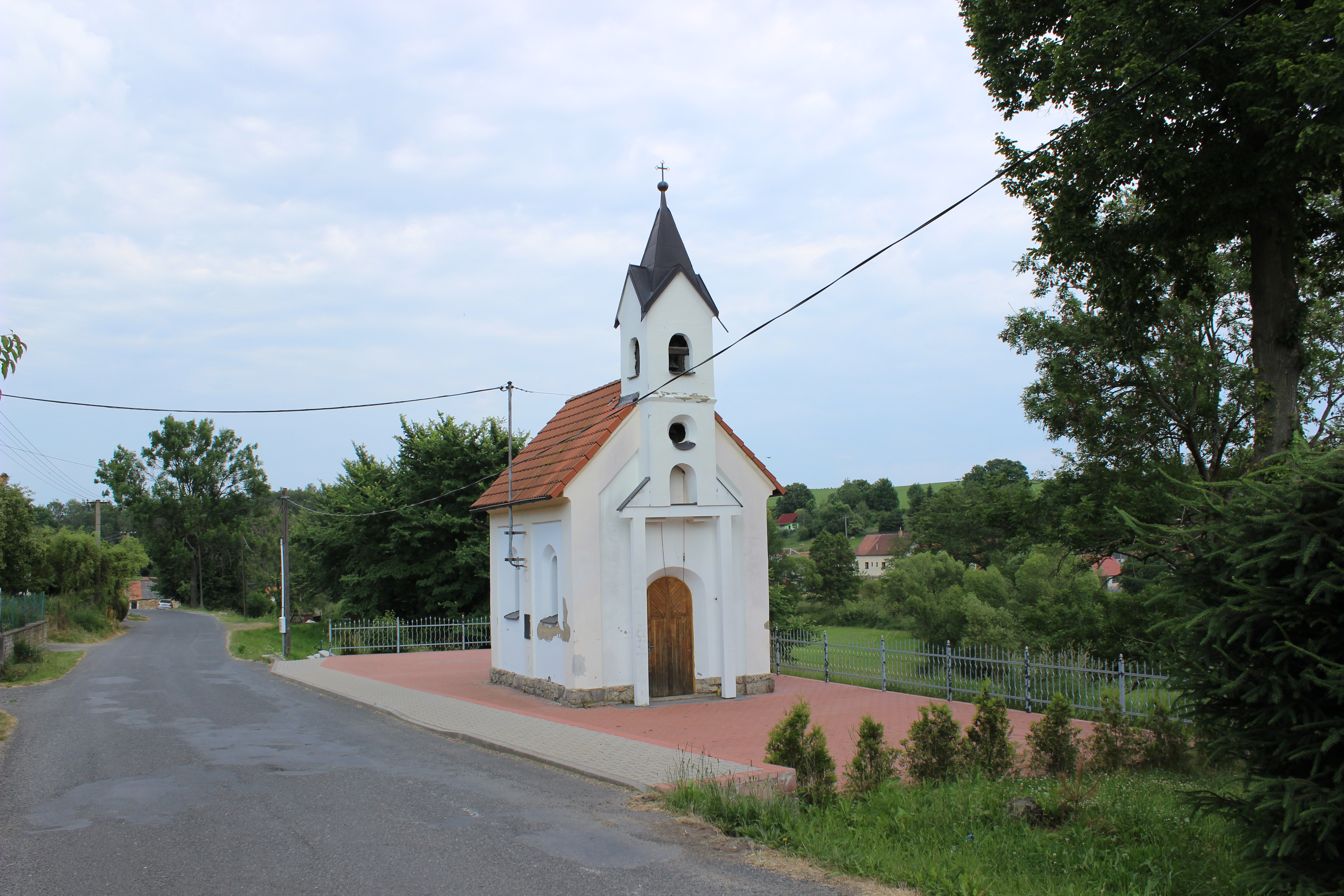 Kaplička ve Strojeticích (pohled od západu).